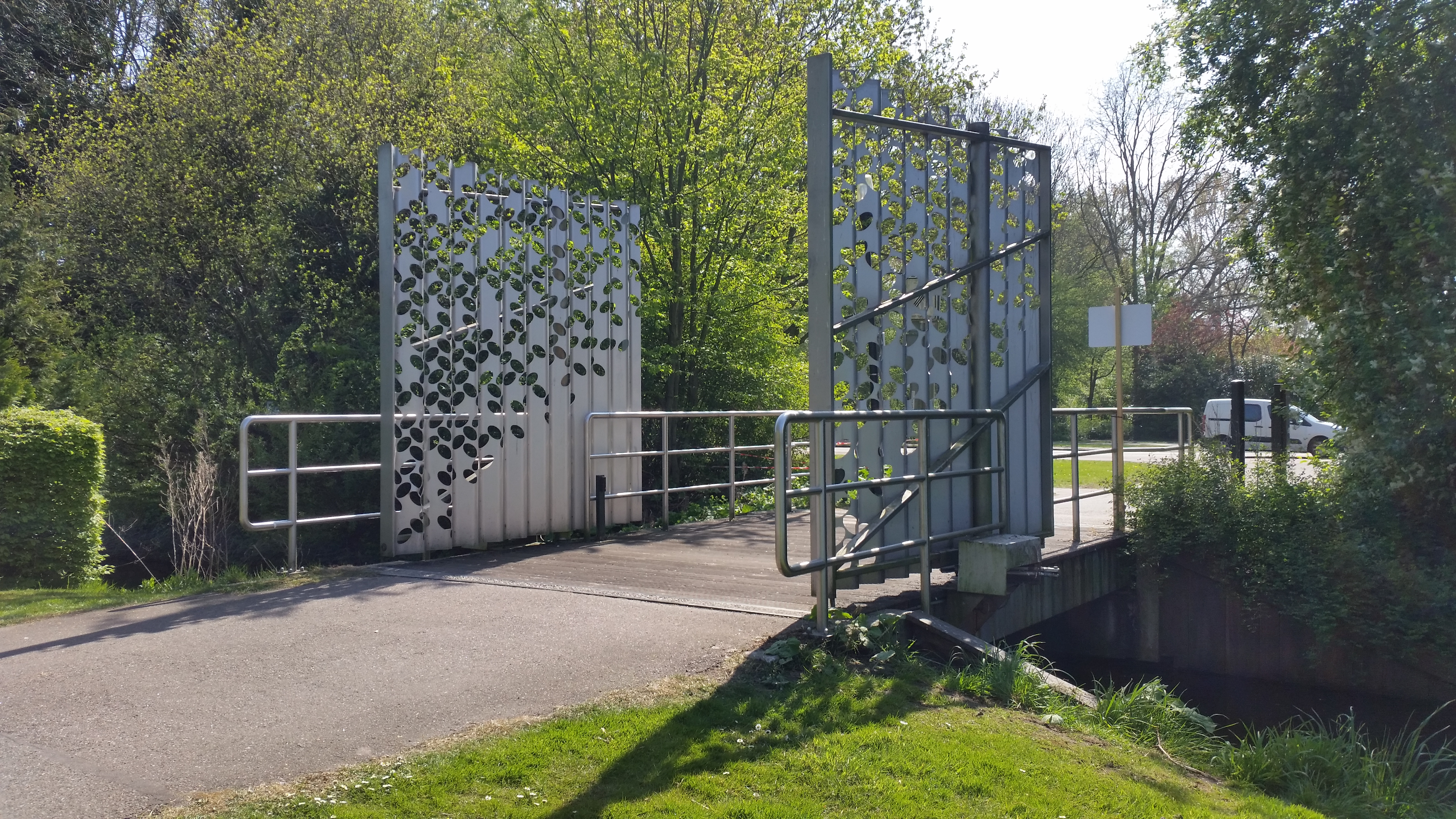 Impressie van brug 441 Nobelweg-Klein Dantzig (april 2020)